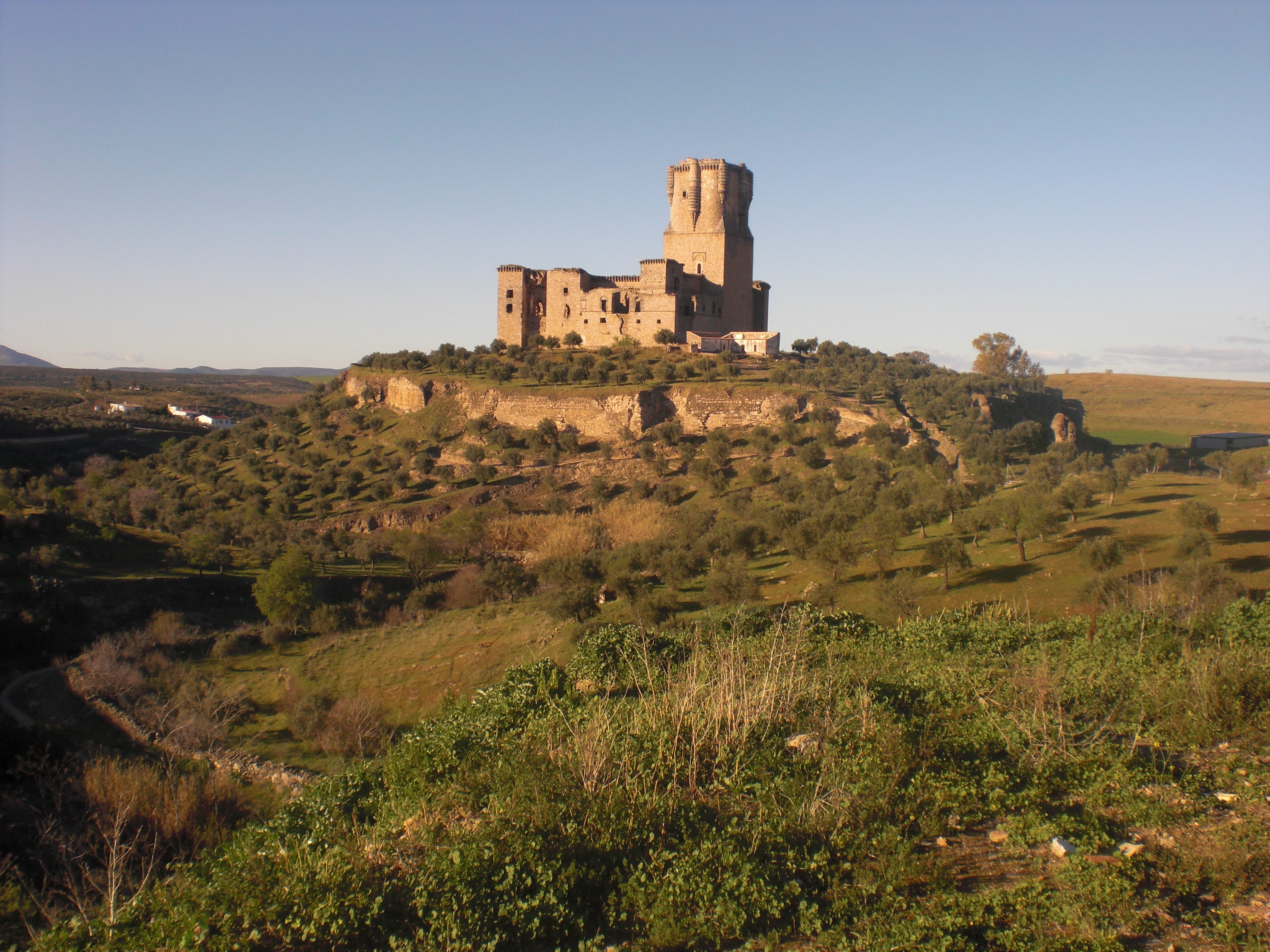 kastelo de Belalcázar